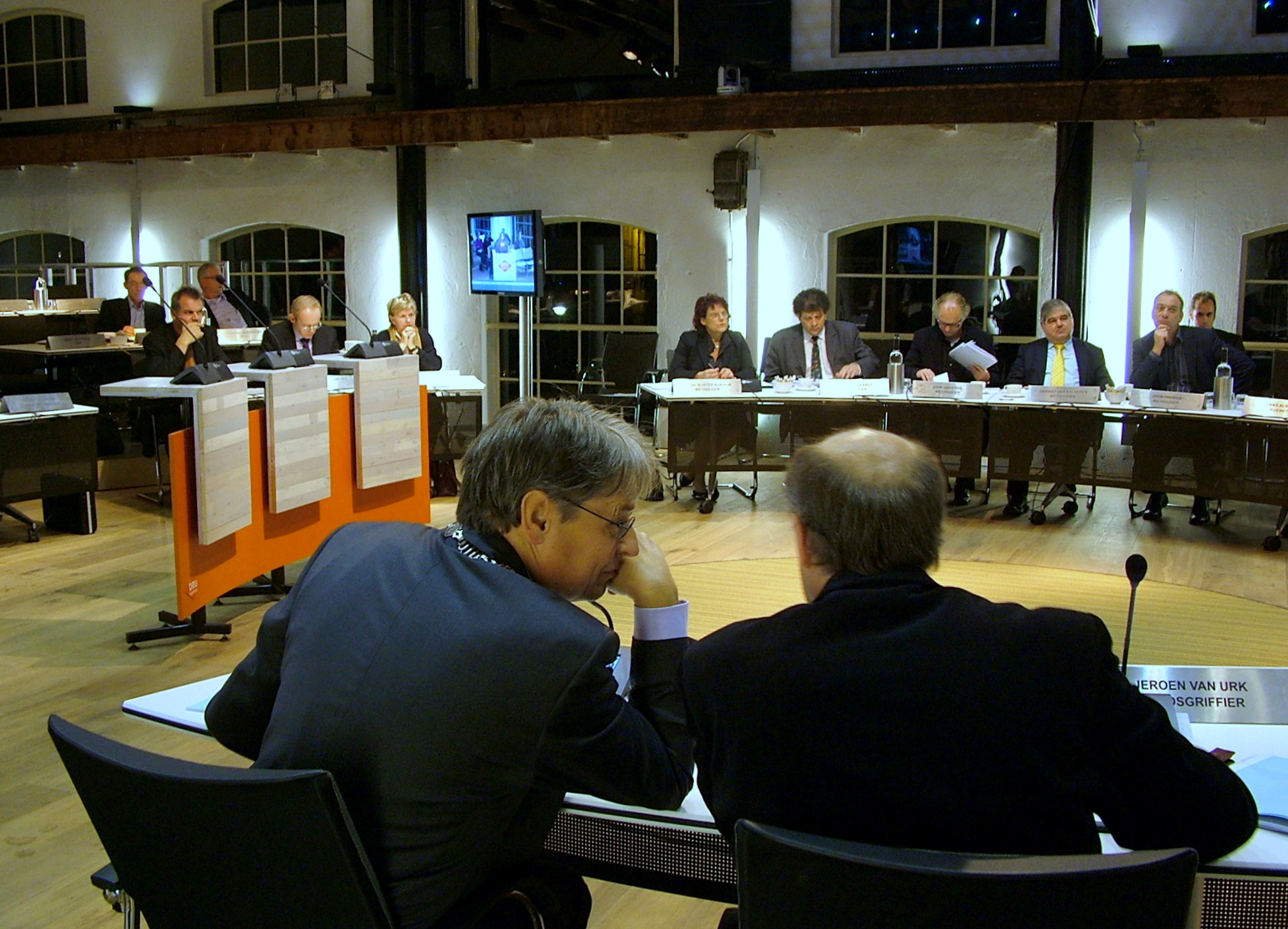 Raadszitting van de gemeente Oude IJsselstreek in de DRU-fabriek (Ulft). Raadsvoorzitter Alberse en Raadsgriffier van Urk, in de achtergrond de wethouders.